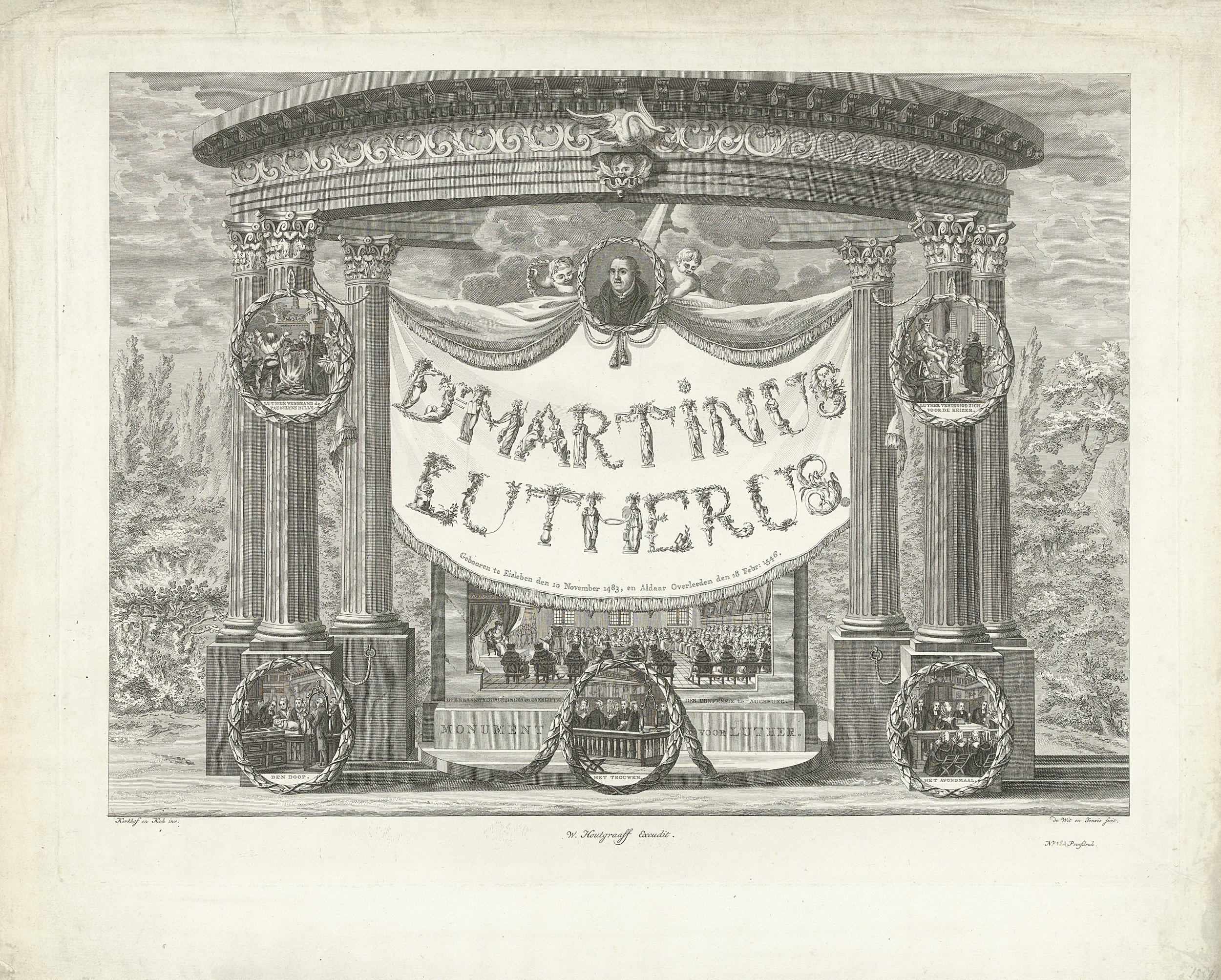 Prent ter ere van Maarten Luther. 18e eeuw